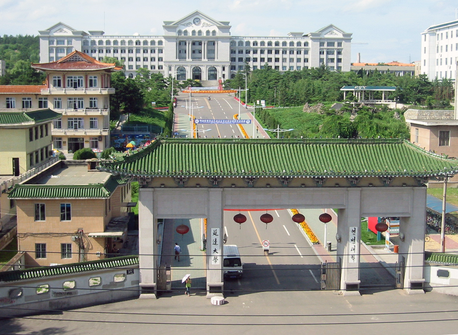 延边大学